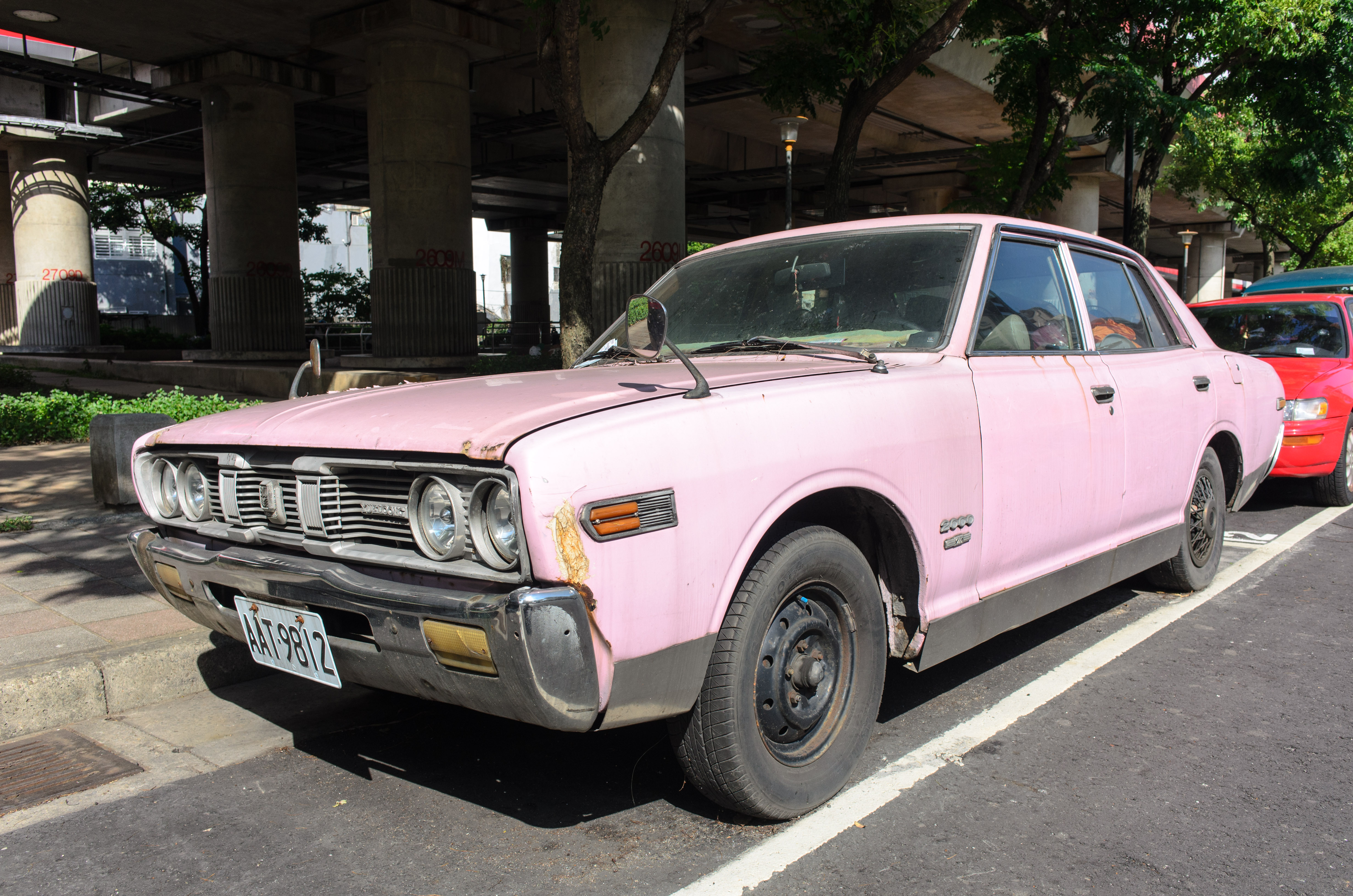 中文（台灣）: 裕隆勝利802車頭左前方，攝於臺北市北投區。